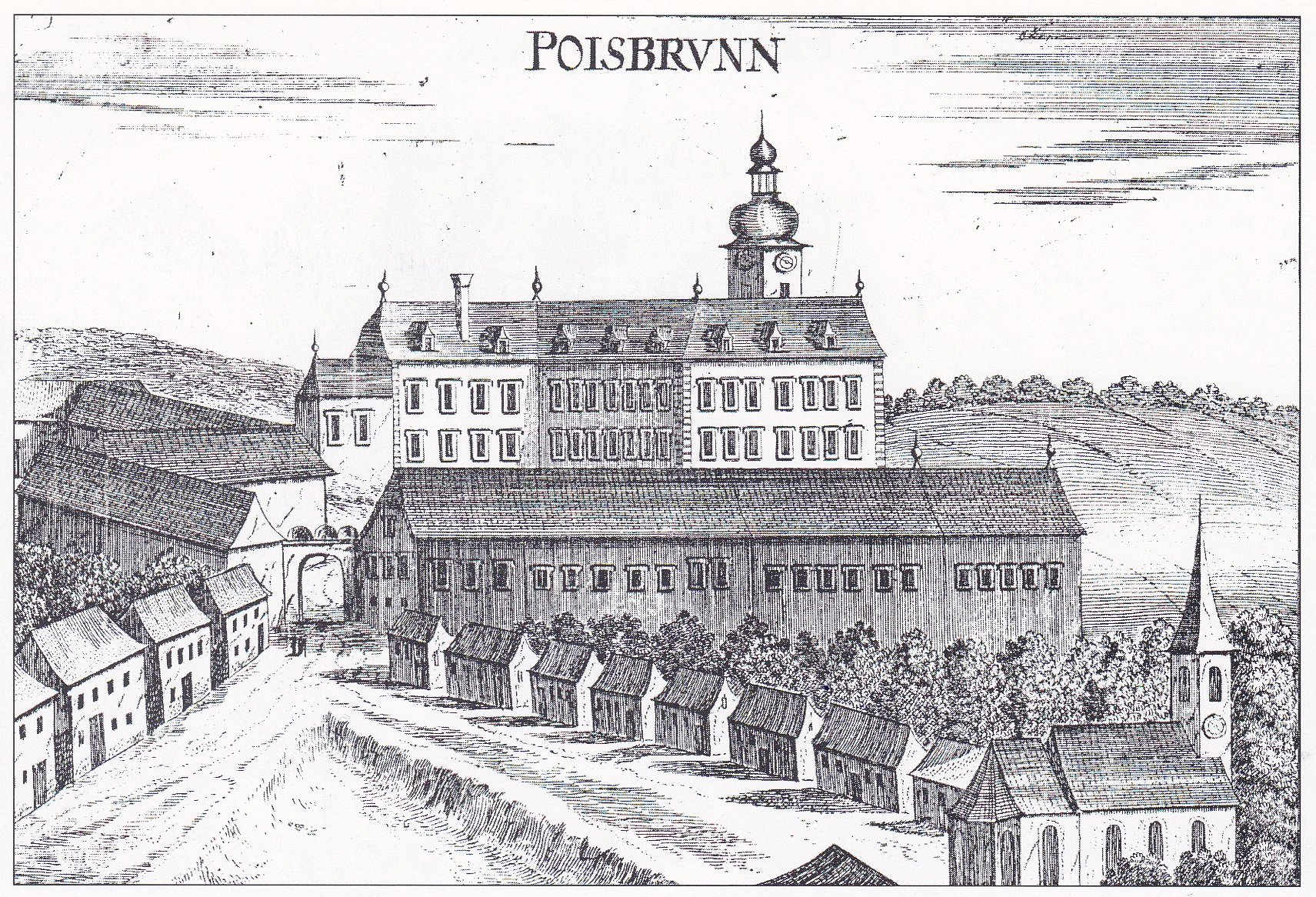 Vischer-Stich des Schloss Poysbrunn um 1672